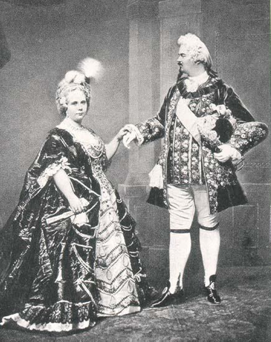 Adalberto de Baviera y su esposa Amalia de Borbón